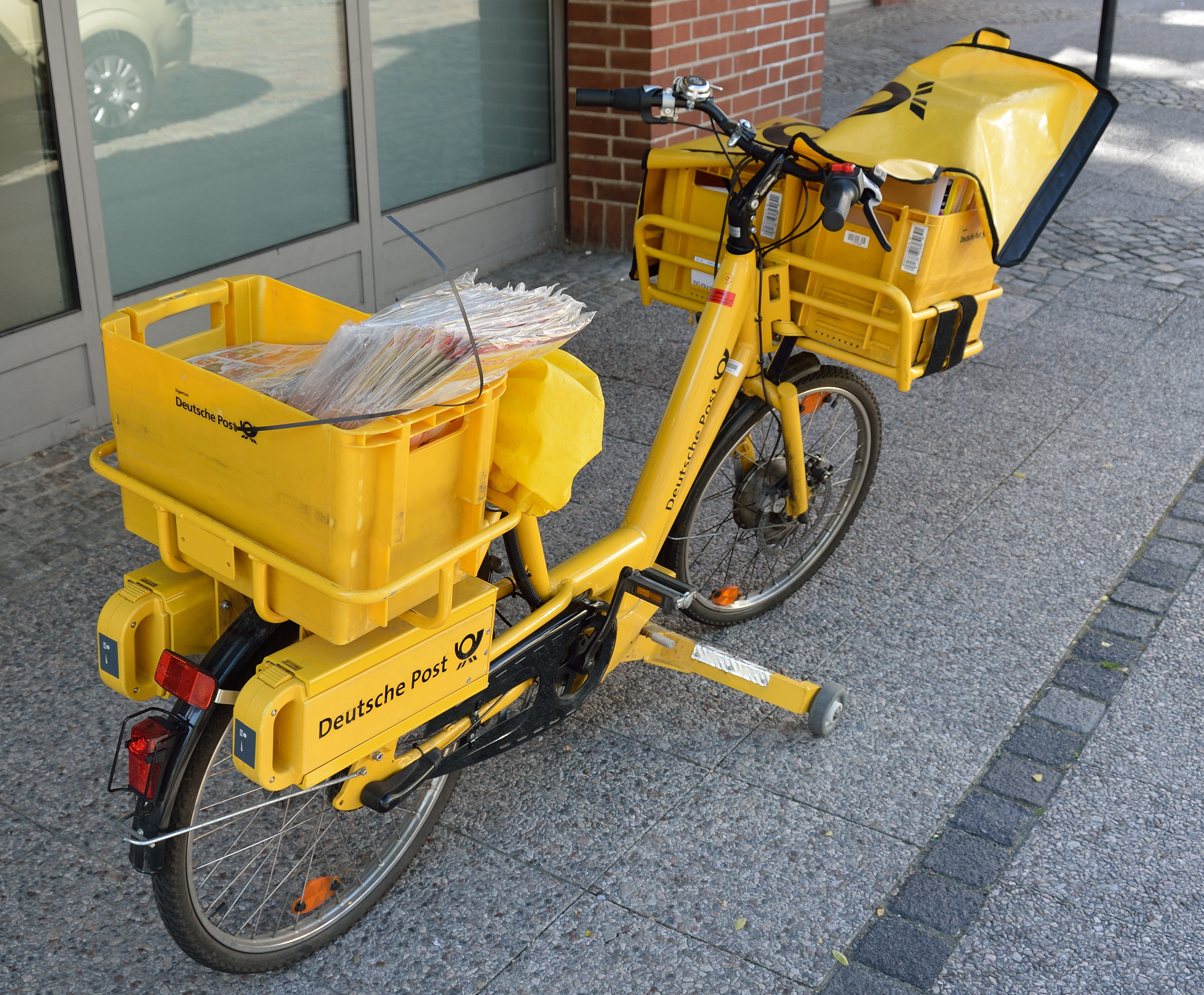 Ein Pedelec der Deutschen Post, aufgenommen in Braunschweig